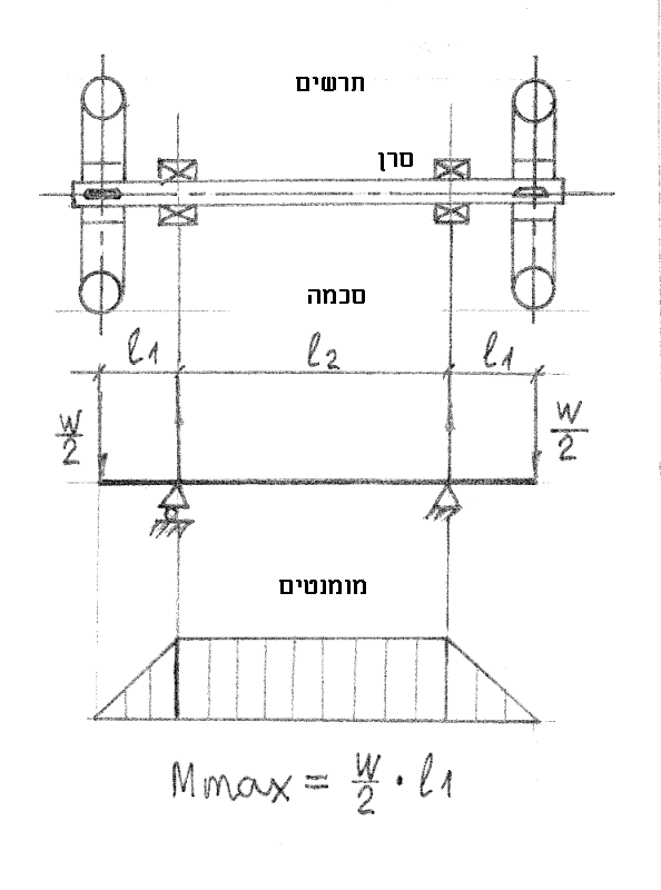 דוגמה למומנט כפיפה בסרן.